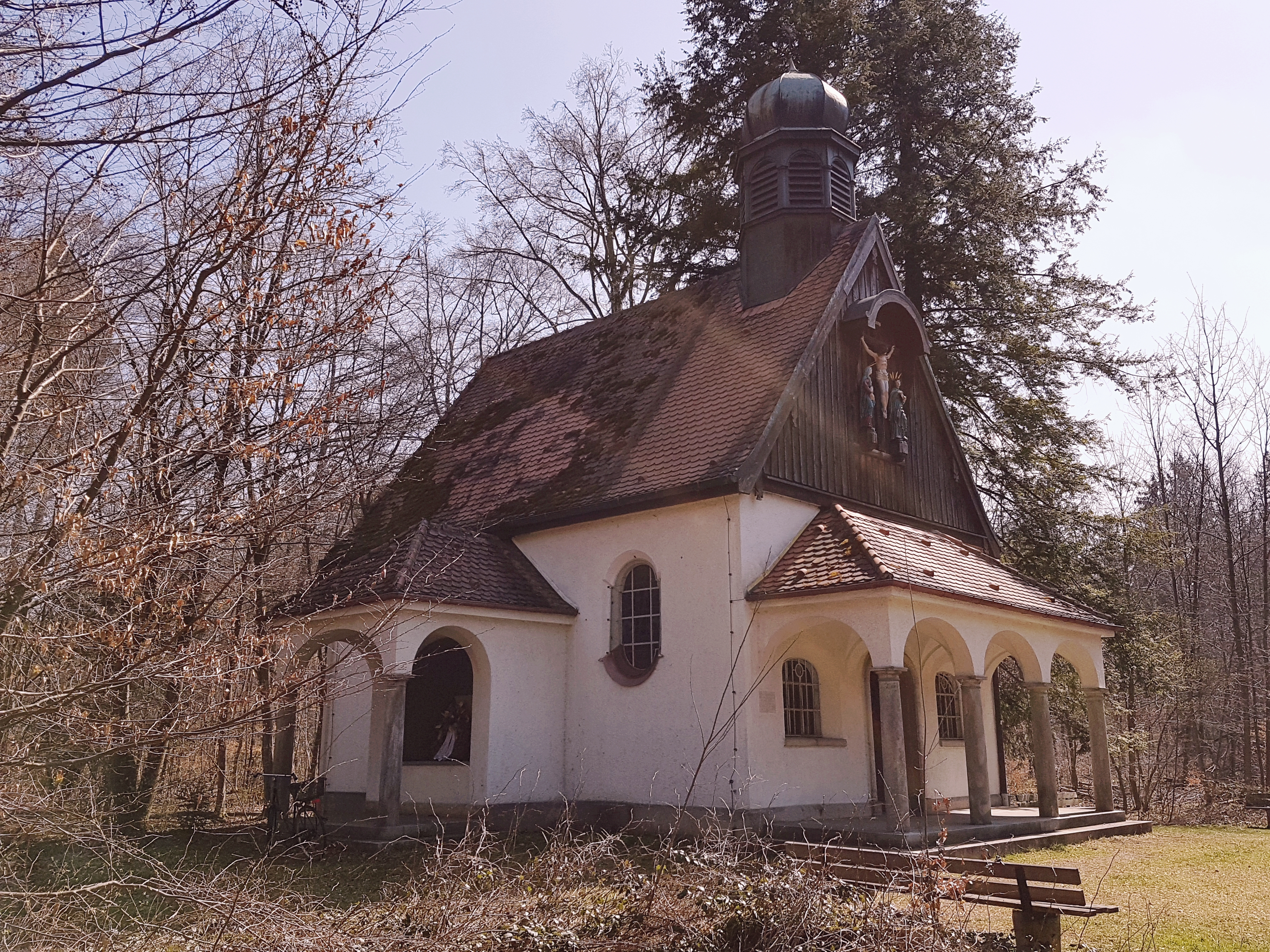 Gräfelfing, Bäckerkapelle